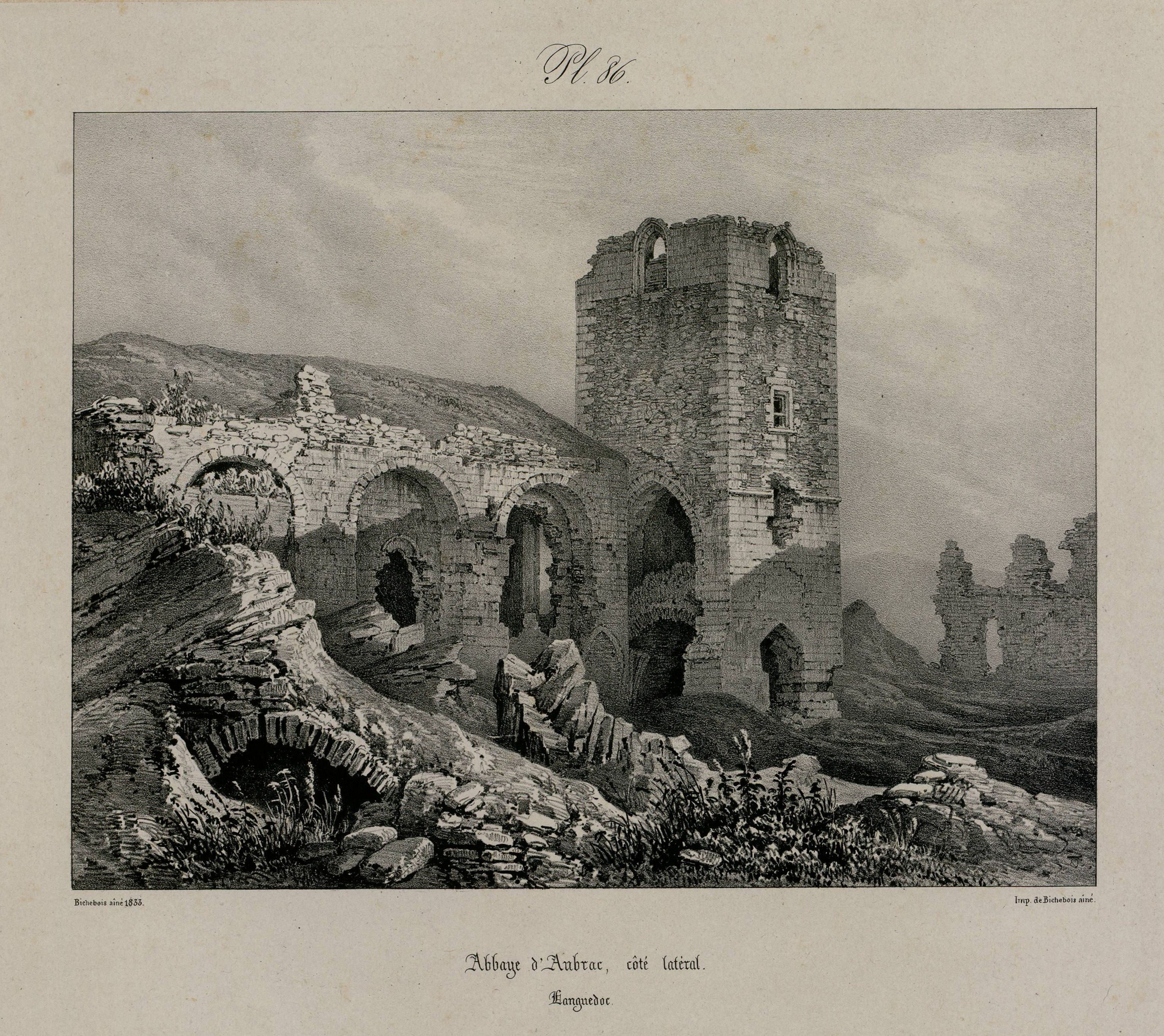 Abbaye d'Aubrac, côté latéral